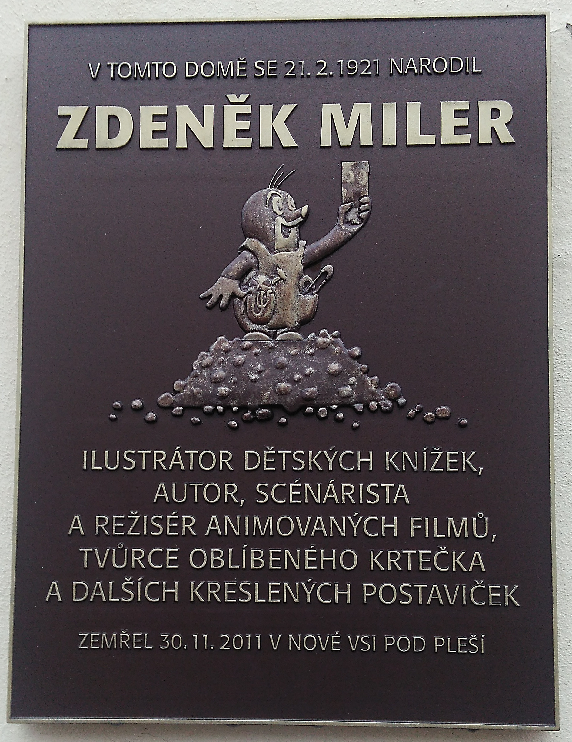 V tomto domě se 21.2.1921 narodil Zdeněk Miler; ilustrátor dětských knížek, autor, scénárista a režisér animovaných filmů, tvůrce oblíbeného krtečka a dalších kreslených postaviček; zemřel 30.11.2011 v Nové Vsi pod Pleší.